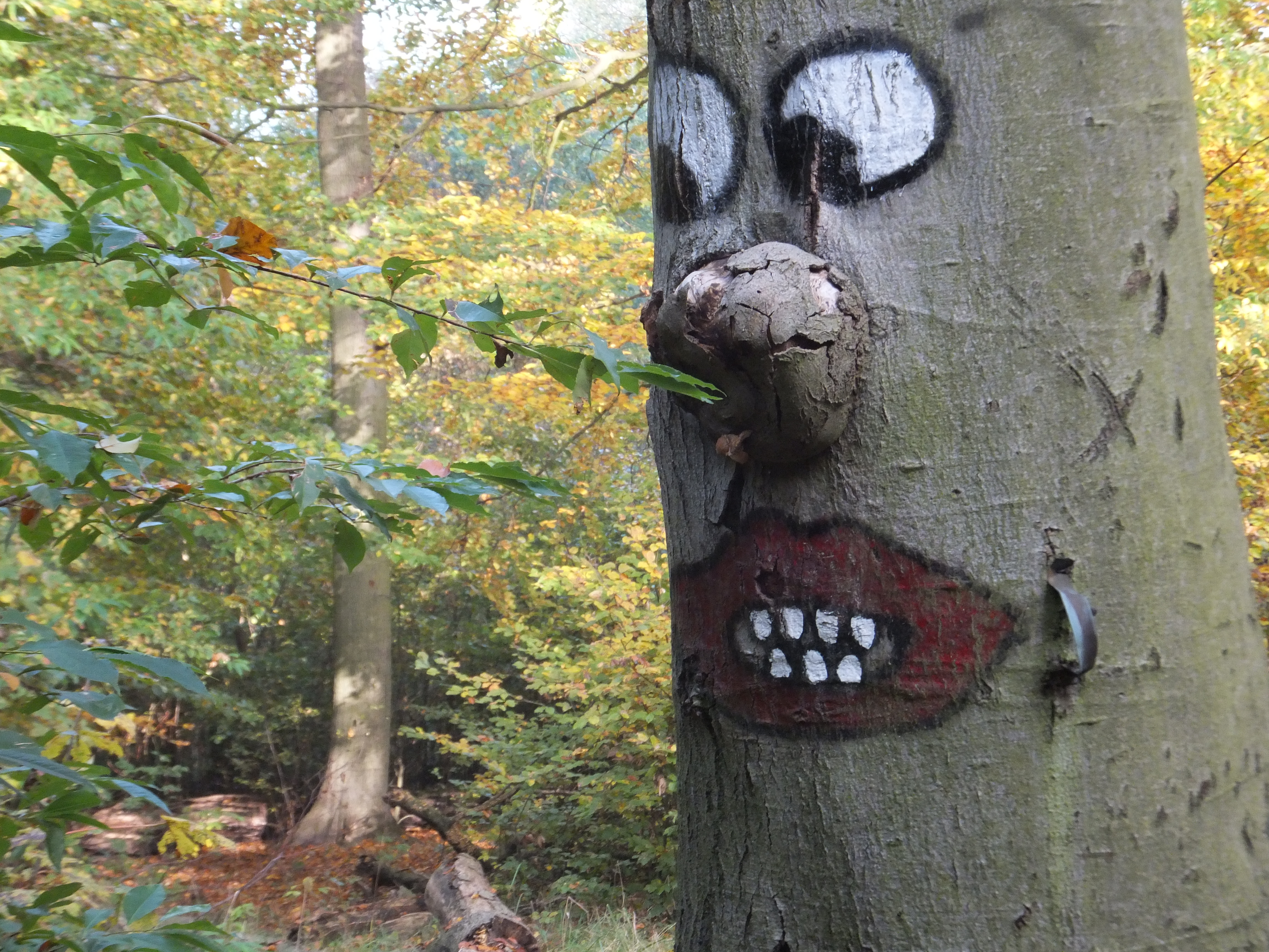 Regenbogensee in der Gemeinde Wandlitz